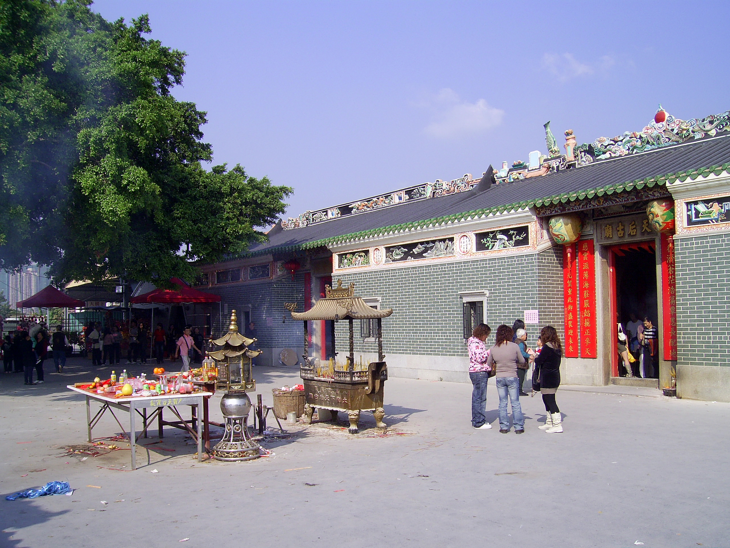 中文（香港）: 大樹下天后廟